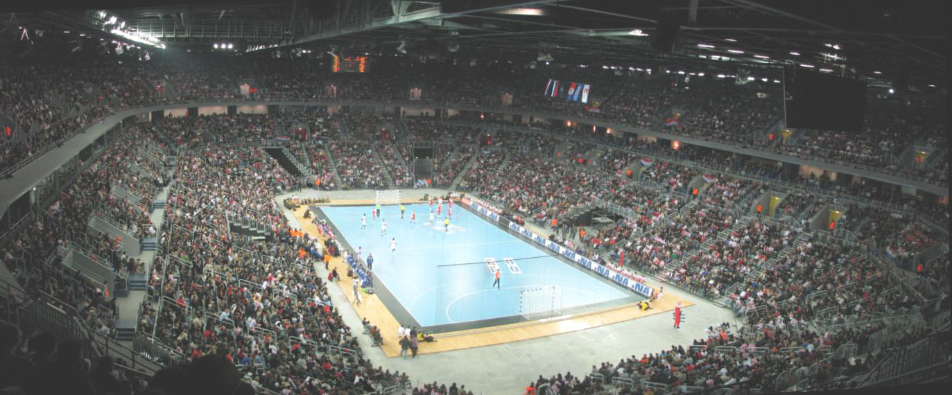 Arena Zagreb tijekom rukometne utakmice Hrvatska-Rusija 27. prosinca 2008. This panoramic image was created with Autostitch (stitched images may differ from reality).